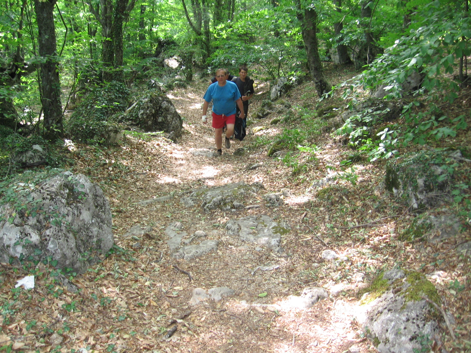 Стежка: Фото